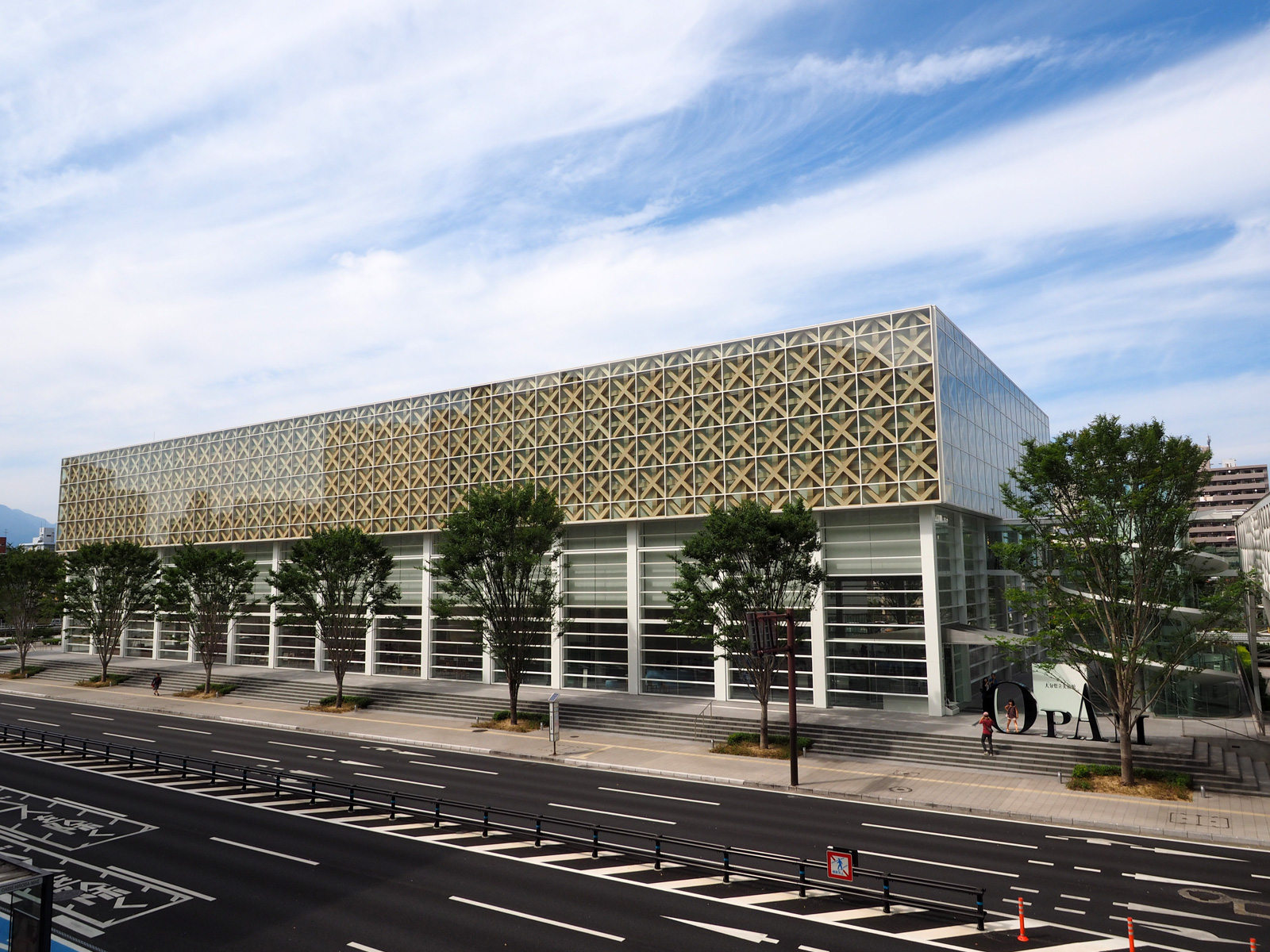 大分県立美術館（大分県大分市）